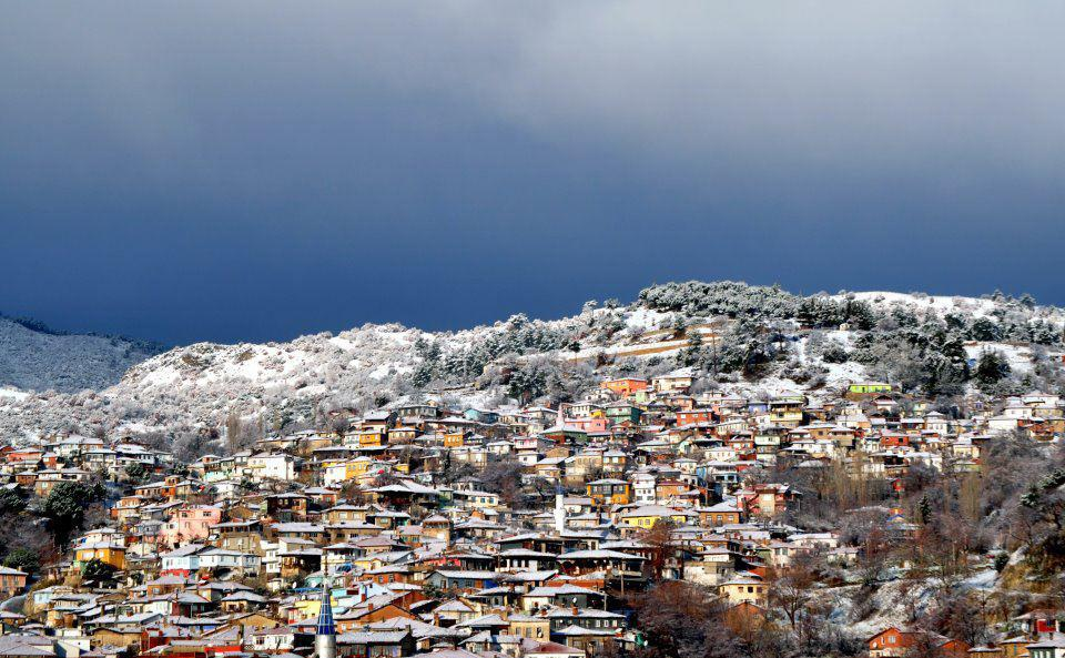 Buldan kış görünümü.